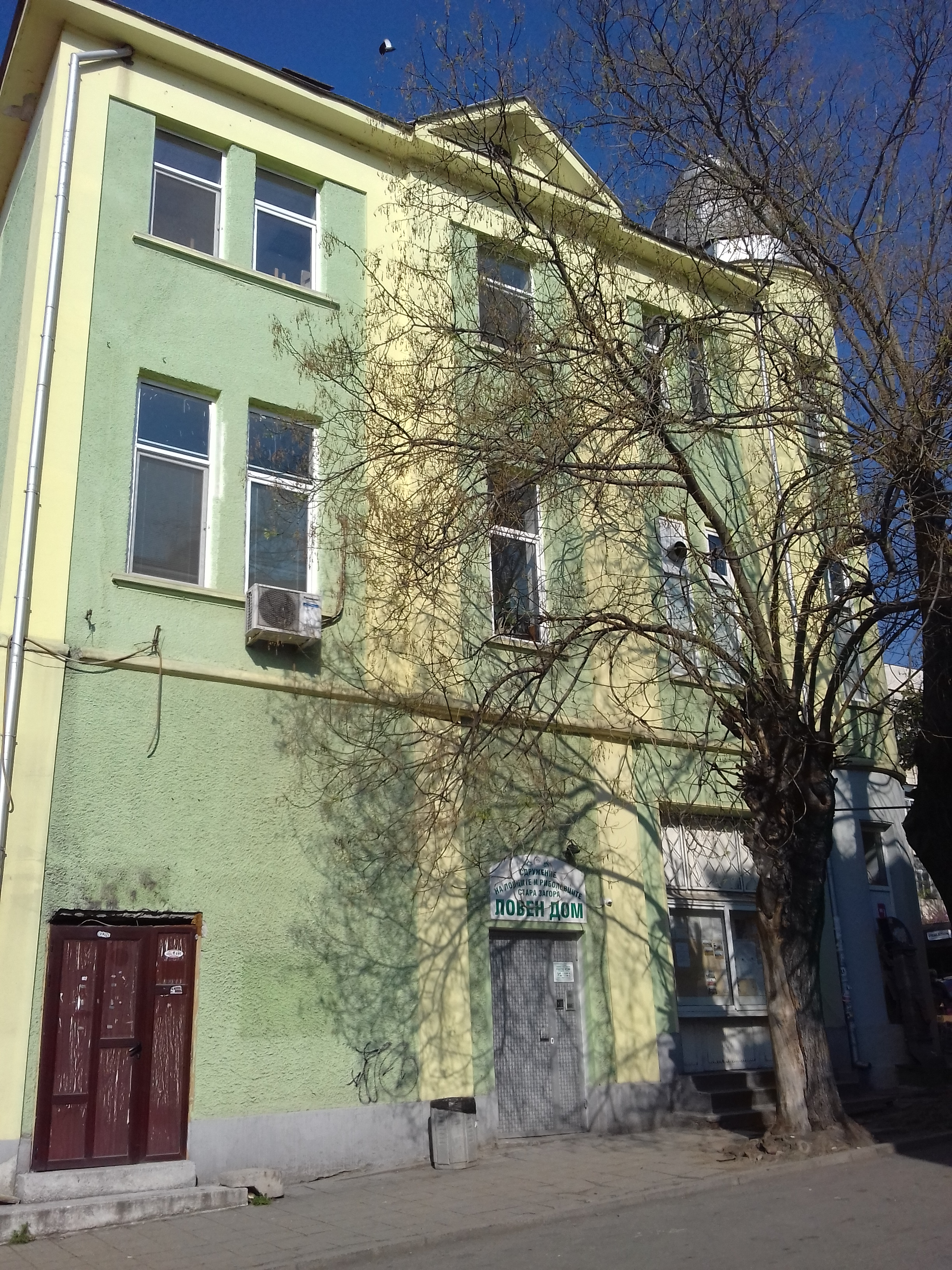 Ловният дом в Стара Загора.